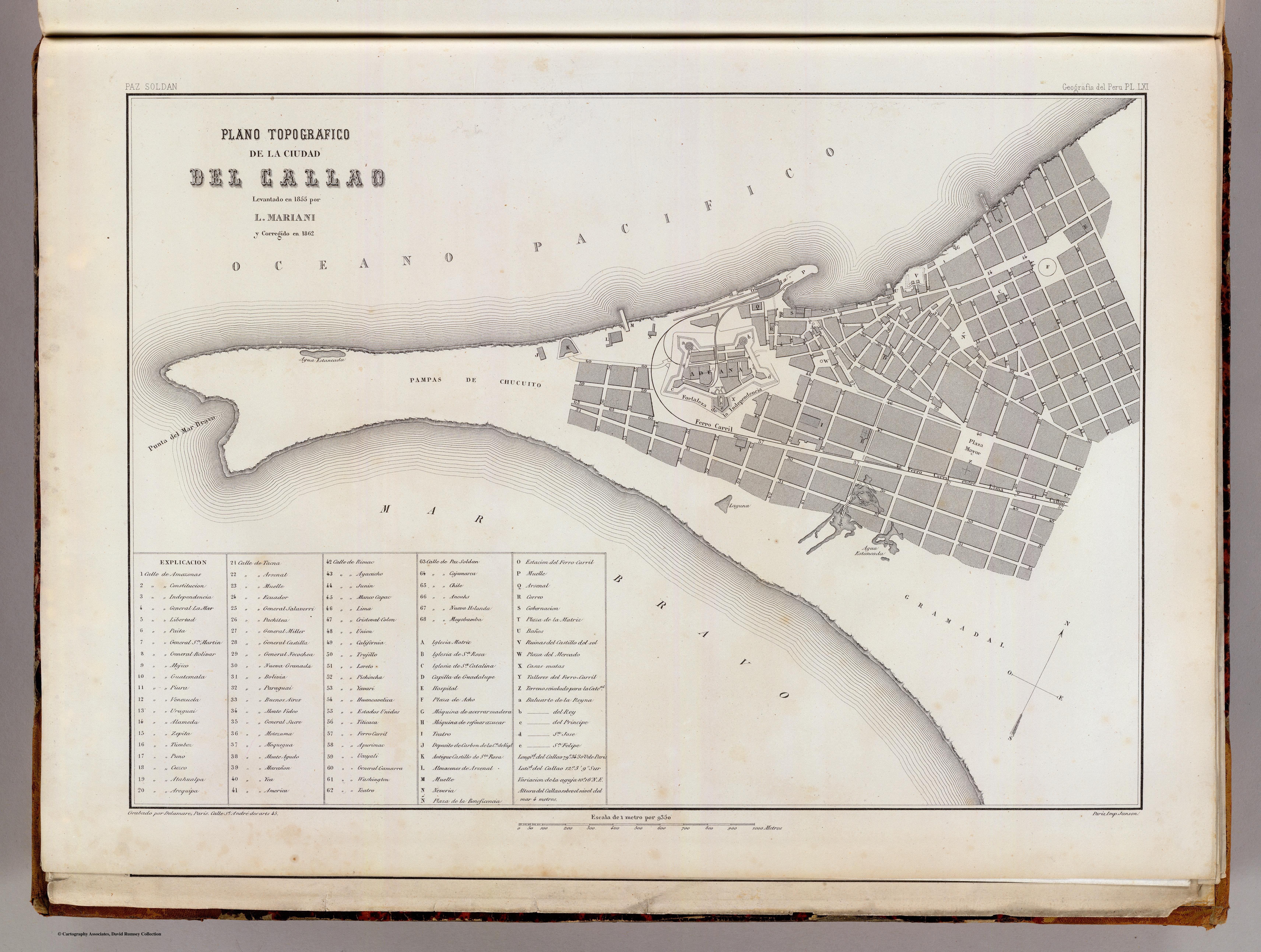 Plano topografico de la Ciudad del Callao. Levantado en en 1855 por L. Mariani y corregido en 1862. Paz Soldan. Geografia del Peru. Grabado por Delamare, Paris, Calle St. Andre des Arts, 45. Paris, Impr. Janson. (Paris, Libreria de Augusto Durand, 1865)